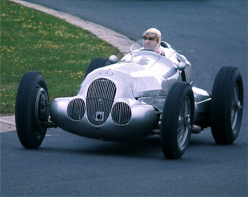 Hermann Lang 1977 im Mercedes W 125 in der Südkehre des Nürburgrings